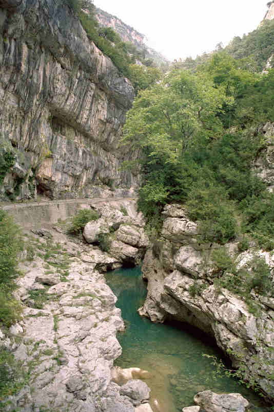 Cañón del Vellos cerca del Parque nacional de Ordesa y Monte Perdido en la provincia de Huesca, (España). Tomada por JMSE el 20 de julio de 2002 y cedida a Wikipedia. Categoría:España (imagen) Categoría:Fotografía (imagen)